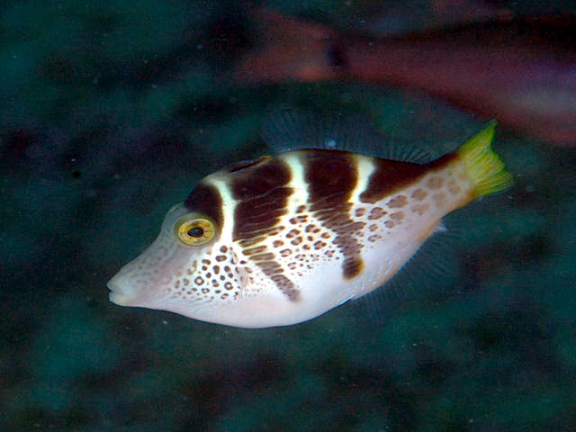 ノコギリハギ Paraluteres prionurus